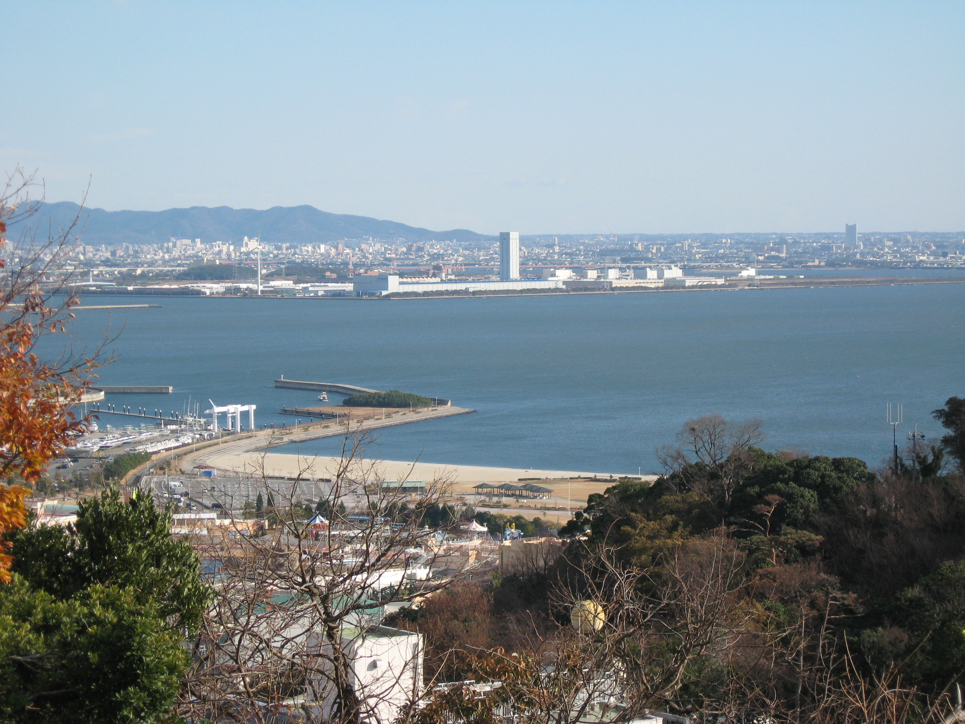 三河湾 - 豊橋